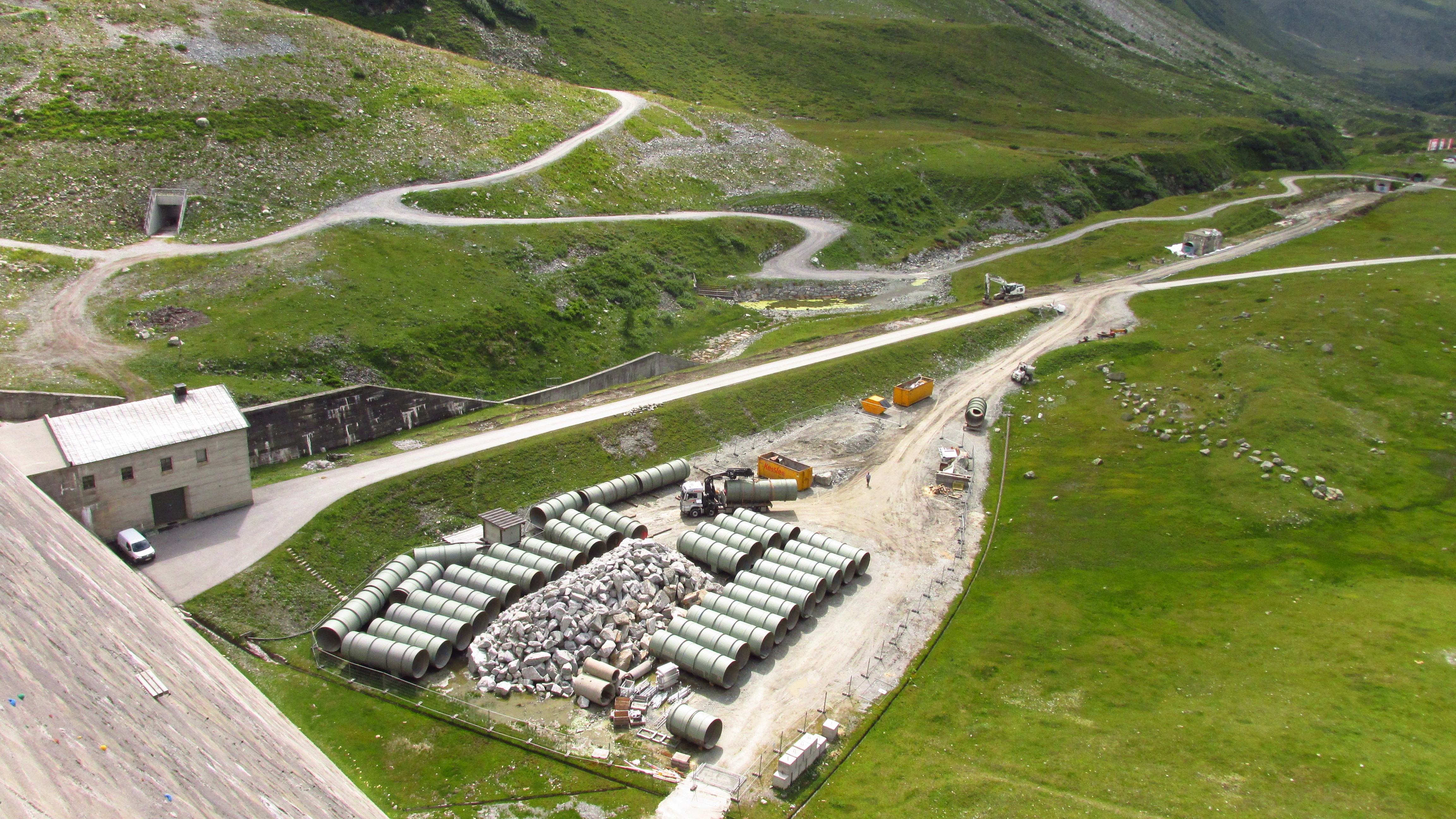 Blick von der Hauptstaumauer des Silvretta-Stausees auf die Demontage der ausgedienten Druckrohrleitung zum Obervermuntwerk I im Sommer 2020